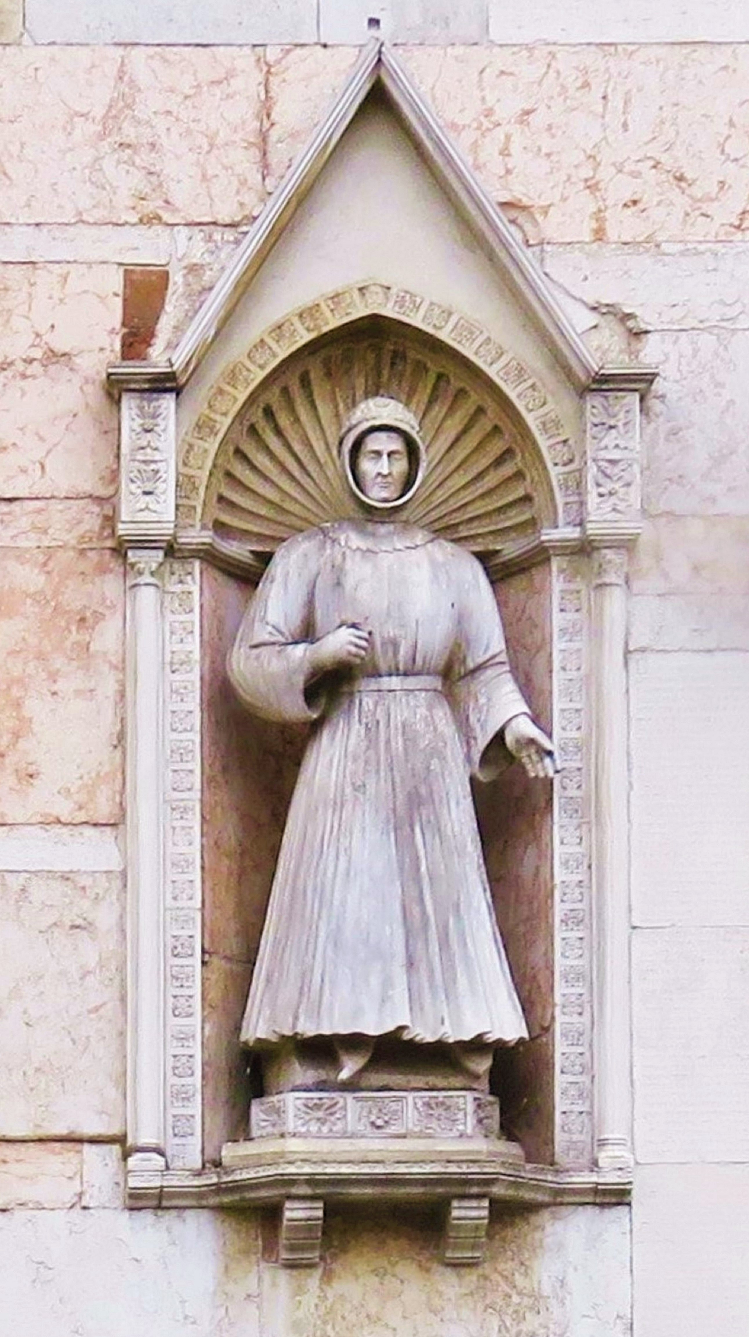 Statua di Alberto V d'Este. Il marchese estense ottenne da papa Bonifacio IX la bolla che permise la fondazione dello Studio di Ferrara, cioè dell'Università di Ferrara, nel 1391